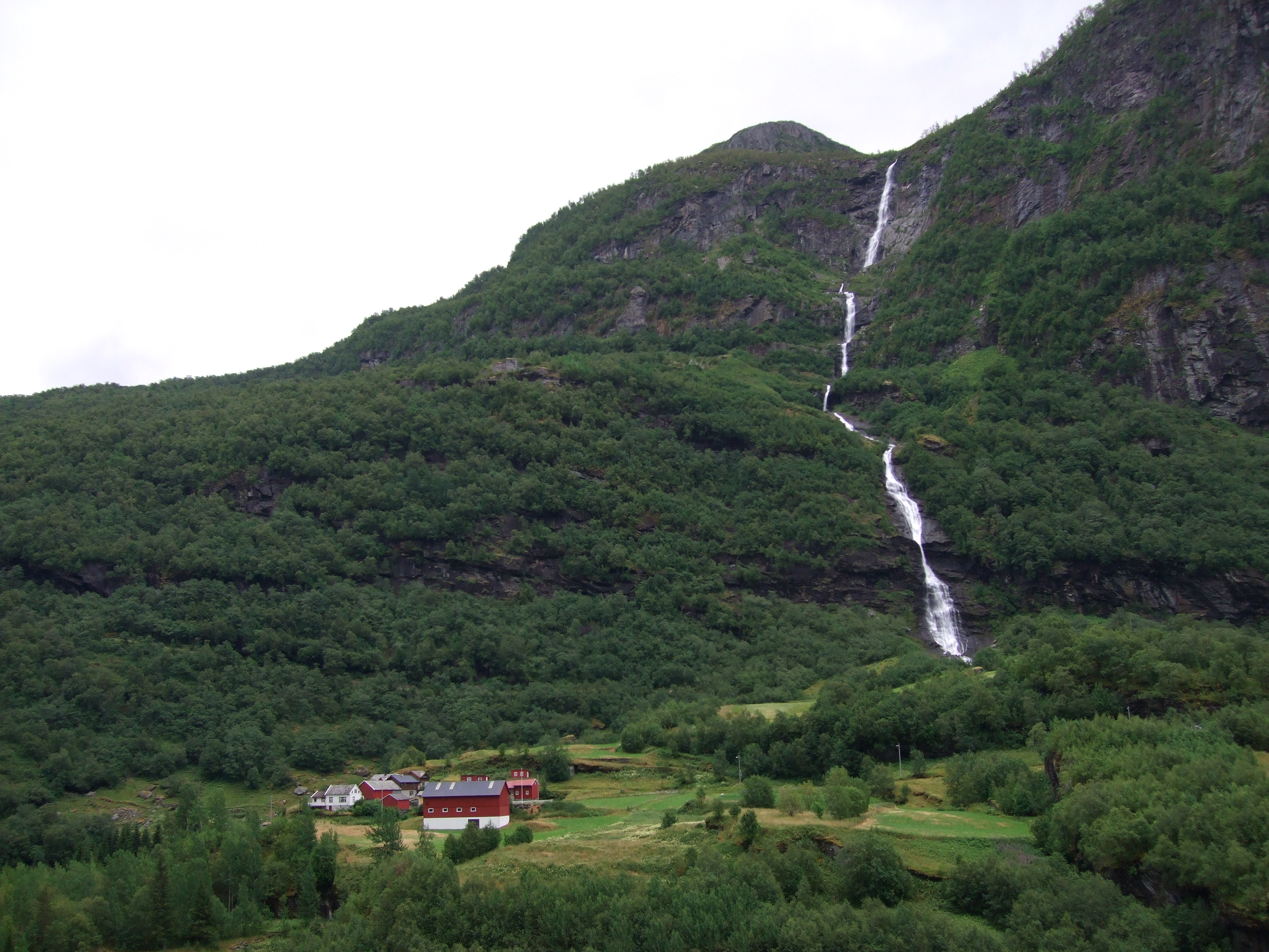 Tunshellefossen frå Flåmsbana